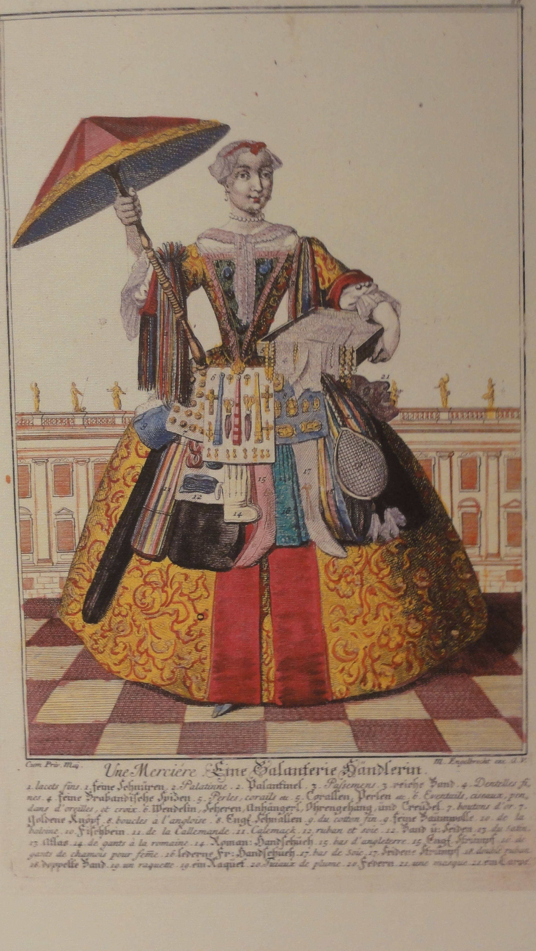 Abb. in L' Assemblage nouveau des manouvries habilles (neu-eröffnete Sammlung der mit ihren eigenen Arbeiten und Werkzeugen eingekleideten Künstlern, Handwerkern und Professionen): Une Merciére / Eine Galanterie Händlerin; Repro